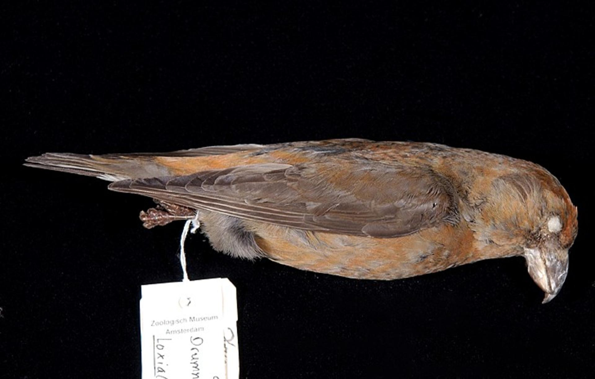 Loxia scotica Hartert, E. , 1904